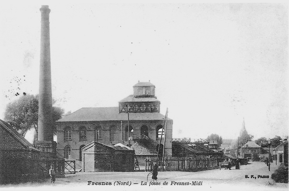 La Fosse Soult n° 1 de la Compagnie des mines de Thivencelle était un charbonnage constitué d'un seul puits situé à Fresnes-sur-Escaut, Nord, Nord-Pas-de-Calais, France.